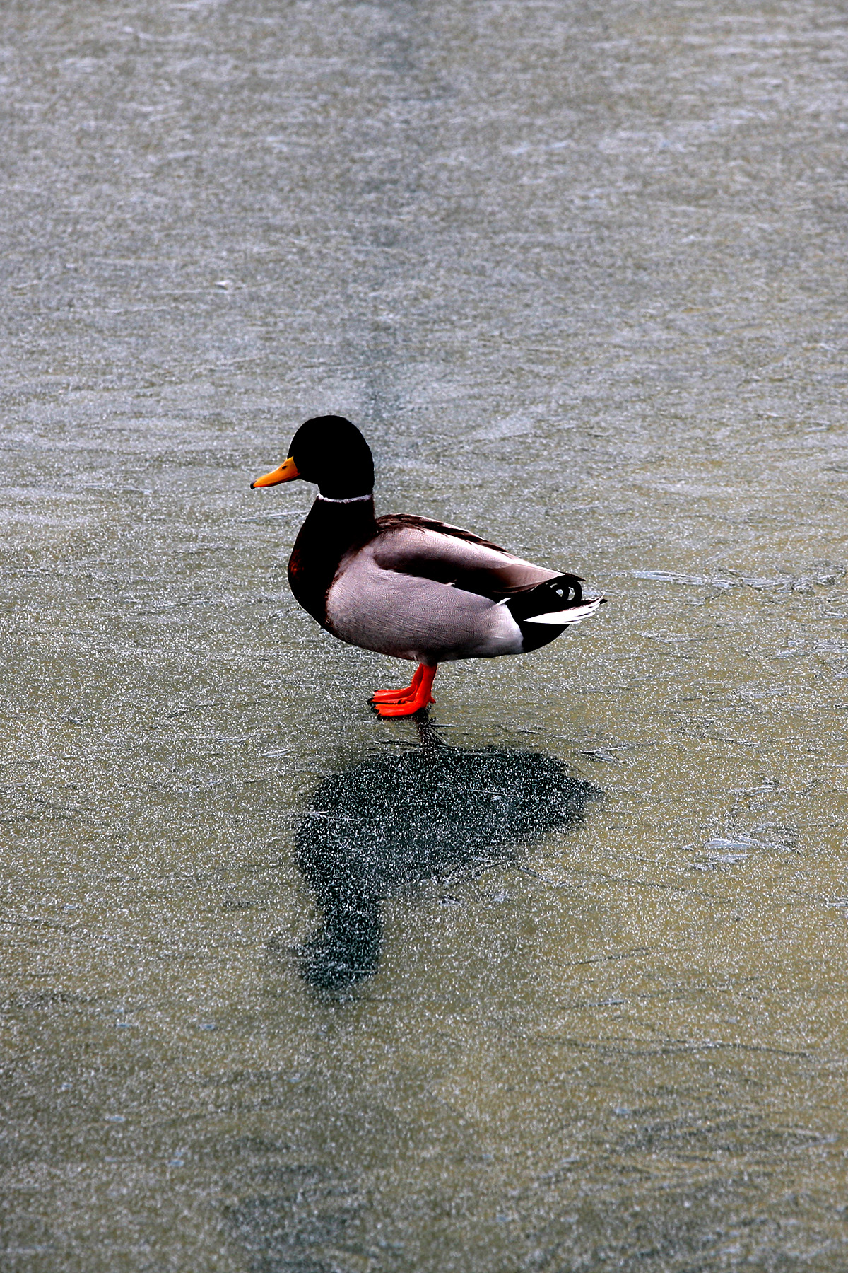 Laghi - Campogalliano